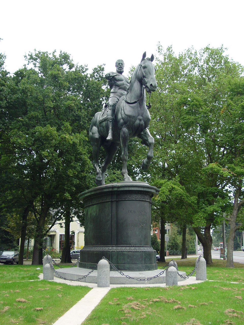 Kaiser Friedrich III., Statue von Louis Tuaillon. Standort: Bremen, Herrmann Böse Str.